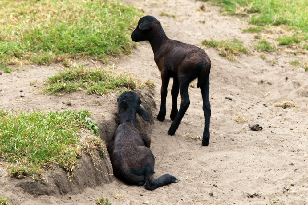 Junge Kamerunschafe im Wild- und Freizeitpark Ostrittrum